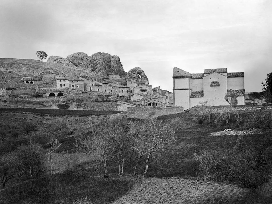 Imatge